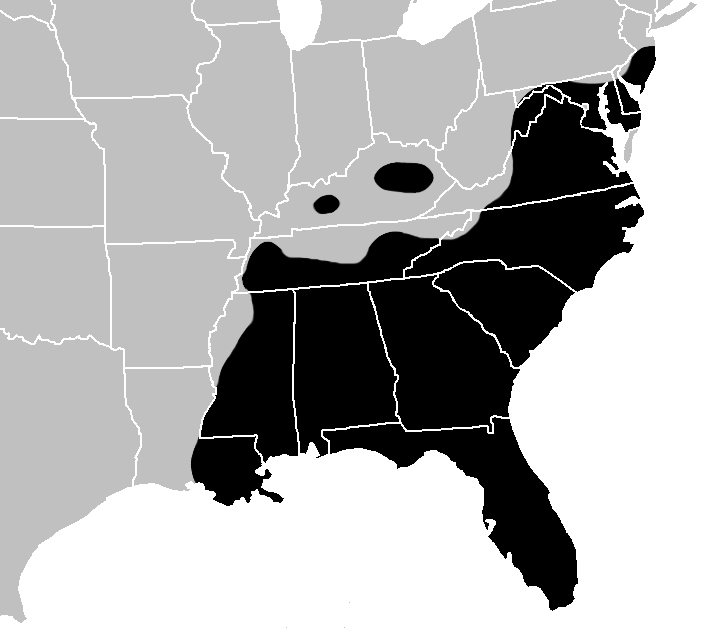 Verbreitungskarte Pantherophis guttatus nach Köhler & Berg 2005 (G. Köhler, P. Berg: Kornnattern. Herpeton, Offenbach, S. 11.)